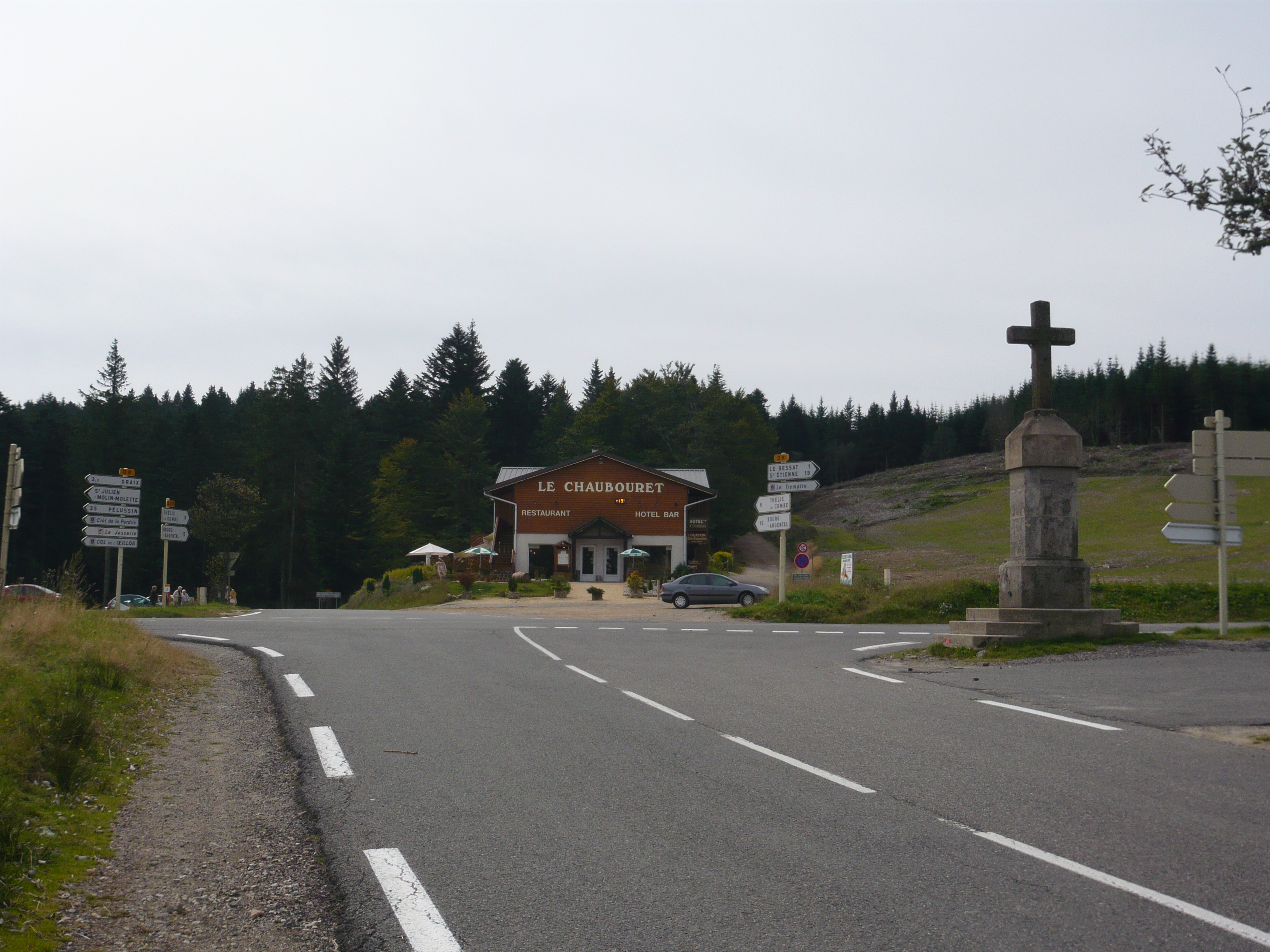 Photo de la Croix de Chaubouret